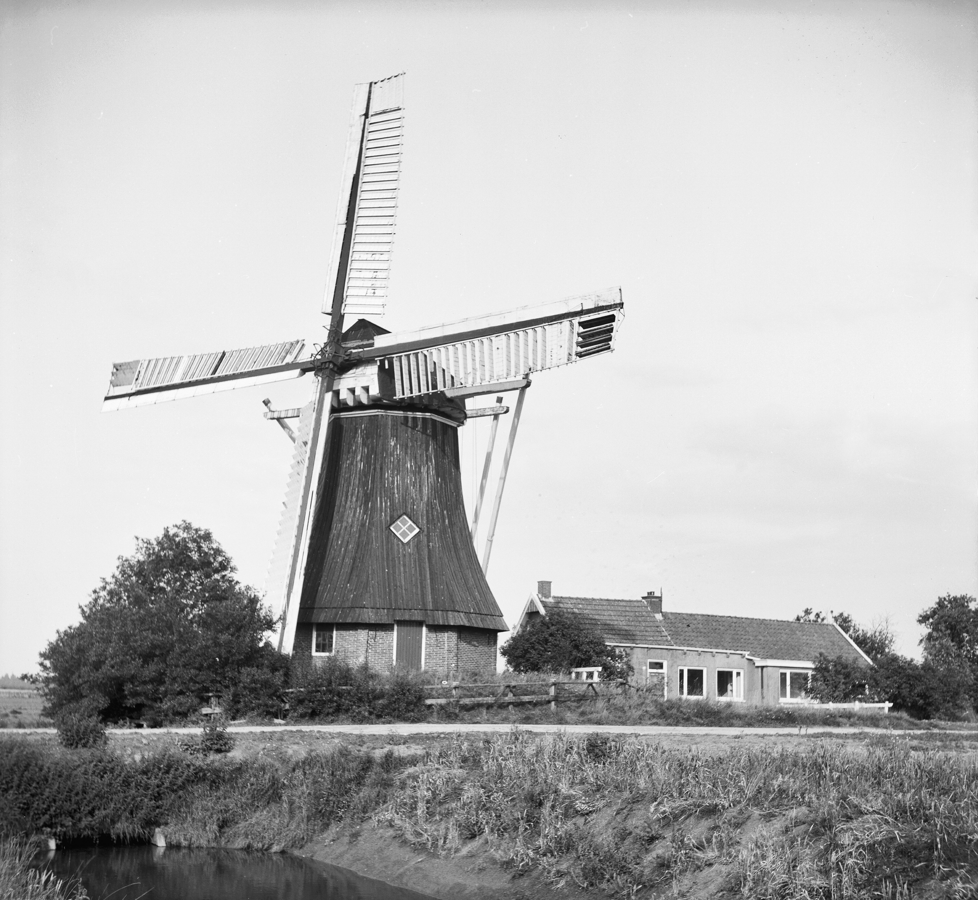 watermolen van de polder De Dellen, overzicht